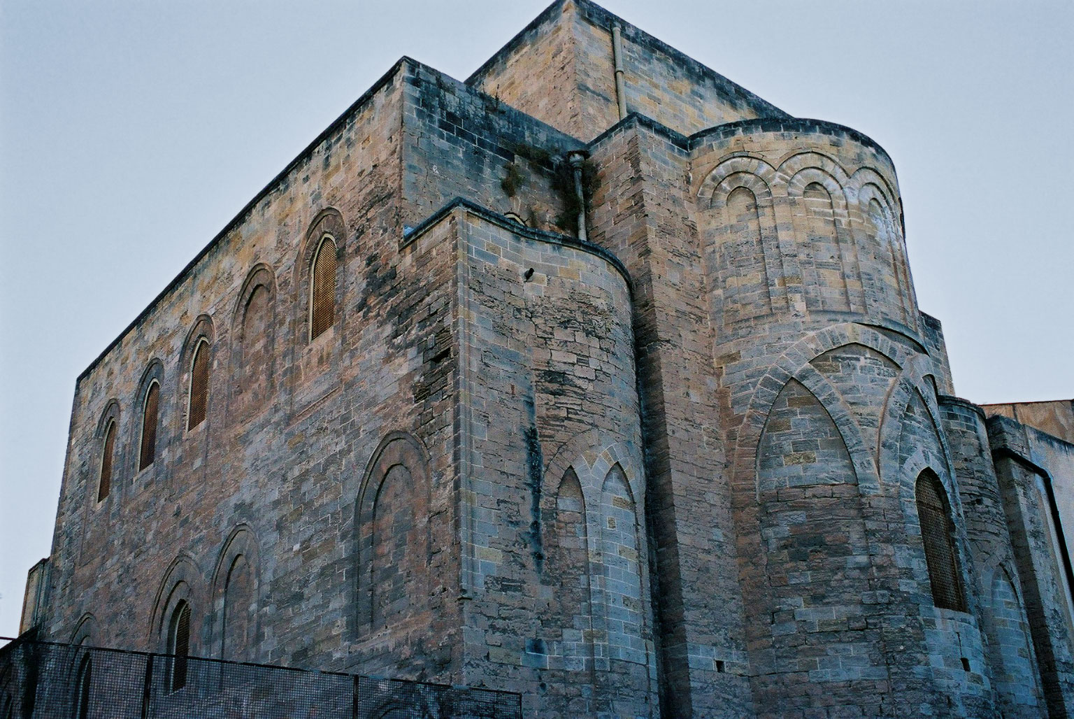 La Magione, Palermo (Chiesa della SS Trinità) Side view